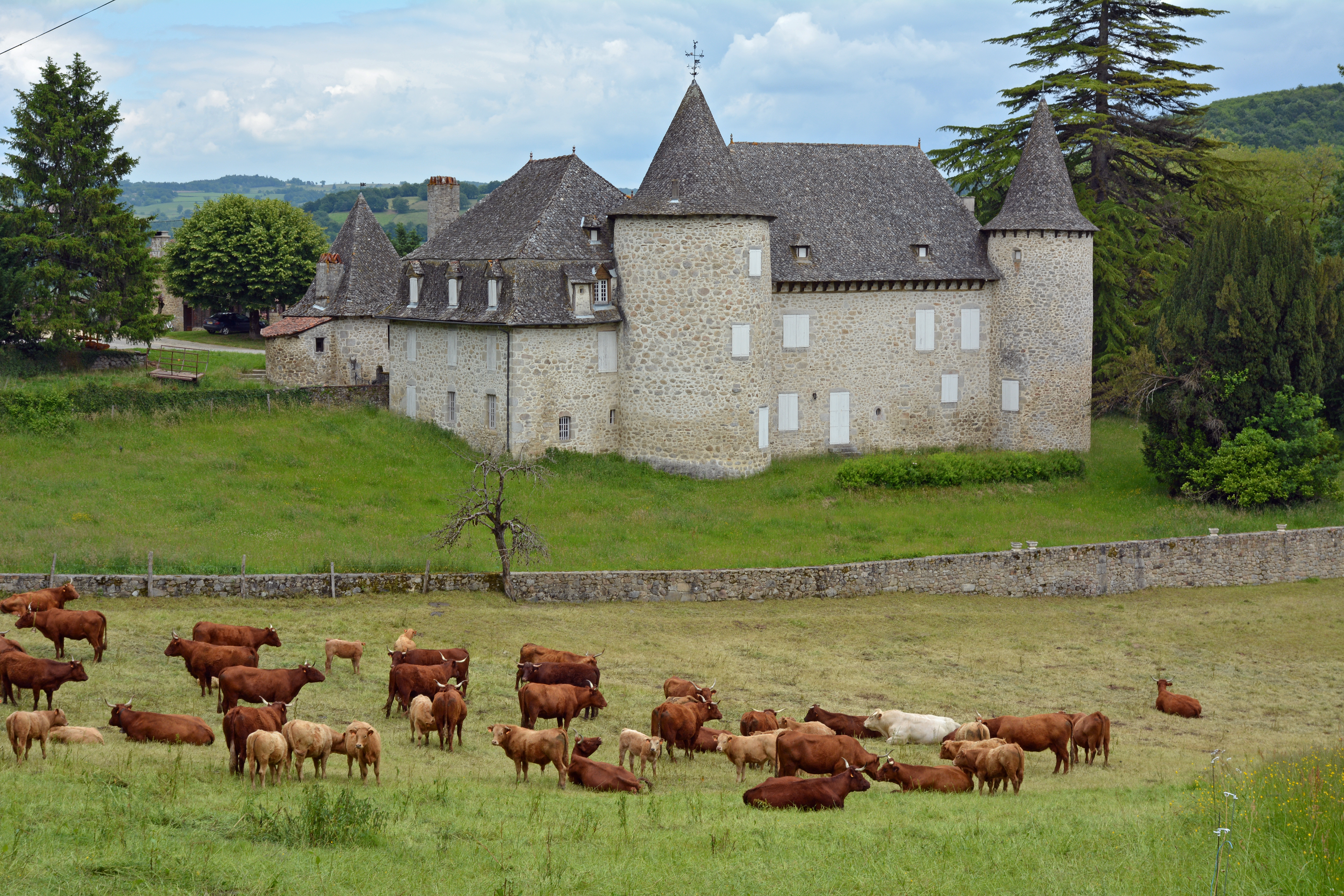 Château d'Entraygues, Cantal Auvergne, France